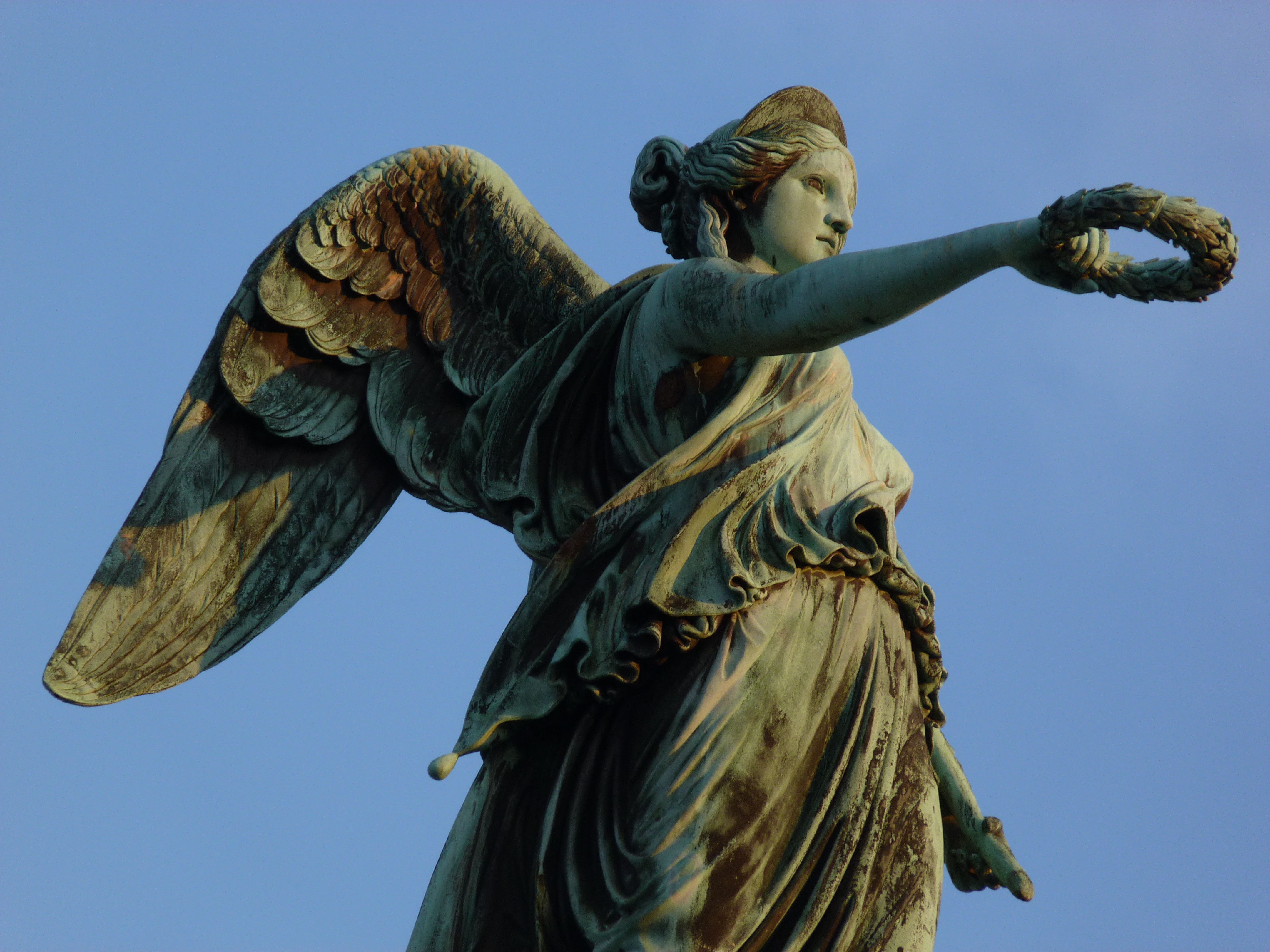 Concordia-Statue (1863) auf der Jubiläumssäule (1841), Schlossplatz, Stuttgart. Bildhauer Ludwig von Hofer.